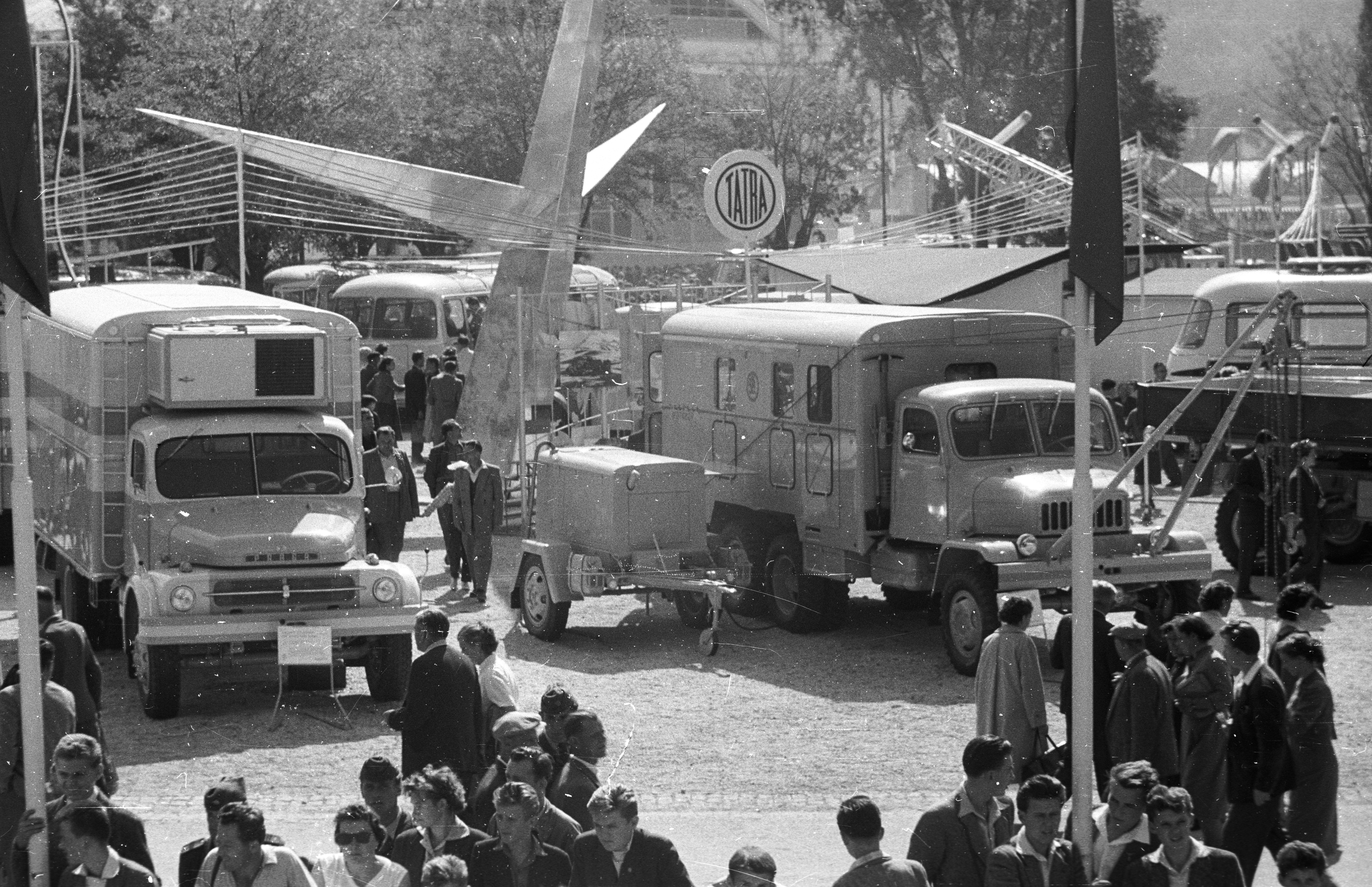 Vásárváros, Brnói Nemzetközi Vásár, Praga teherautók. Location: Czech Republik, Brno Tags: Praga-brand, Czechoslovakia, genre painting, commercial vehicle, bus, compressor, international fair, Tatra-brand Title: Vásárváros, Brnói Nemzetközi Vásár, Praga teherautók.